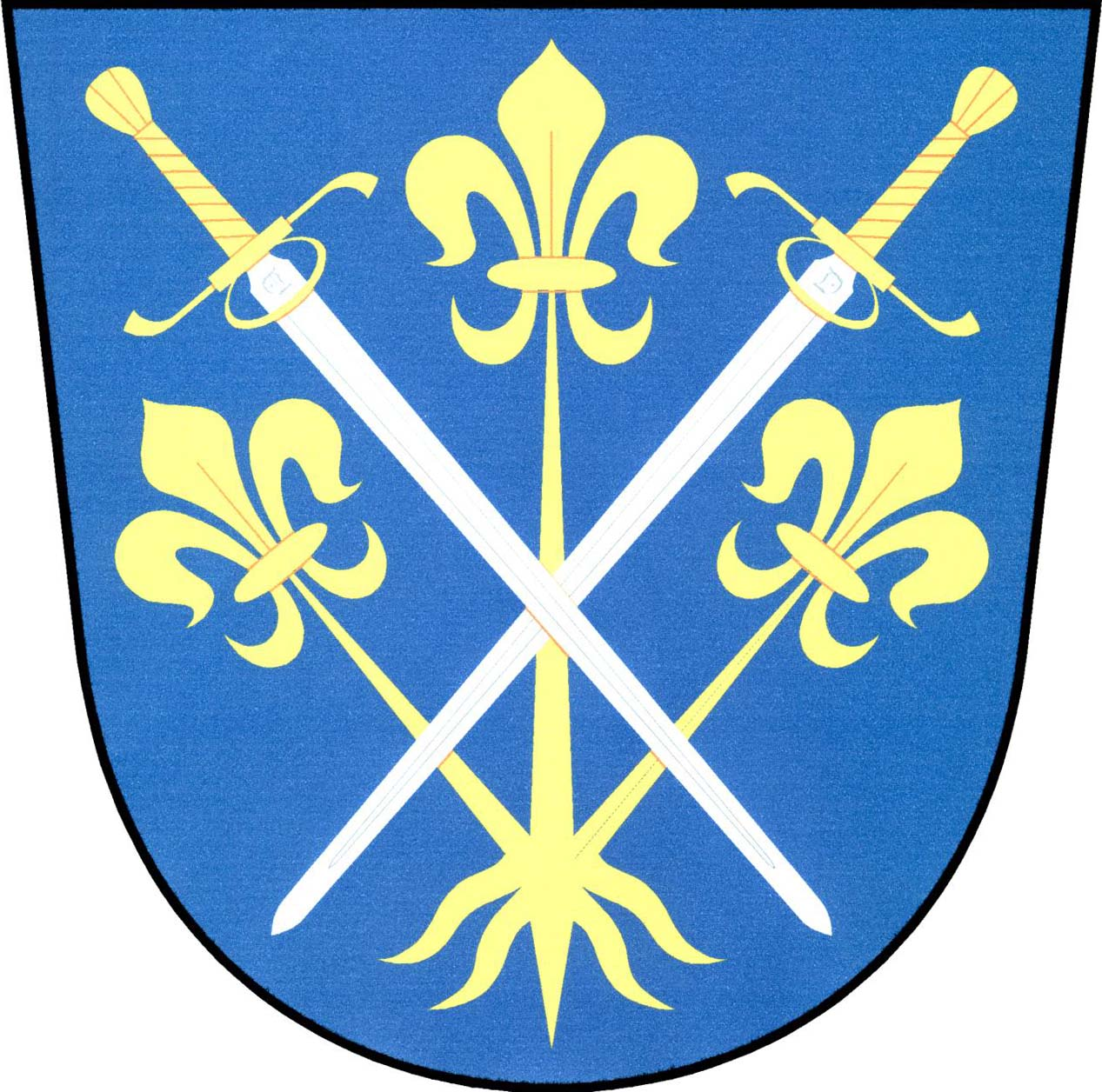 Znak obce Radostice